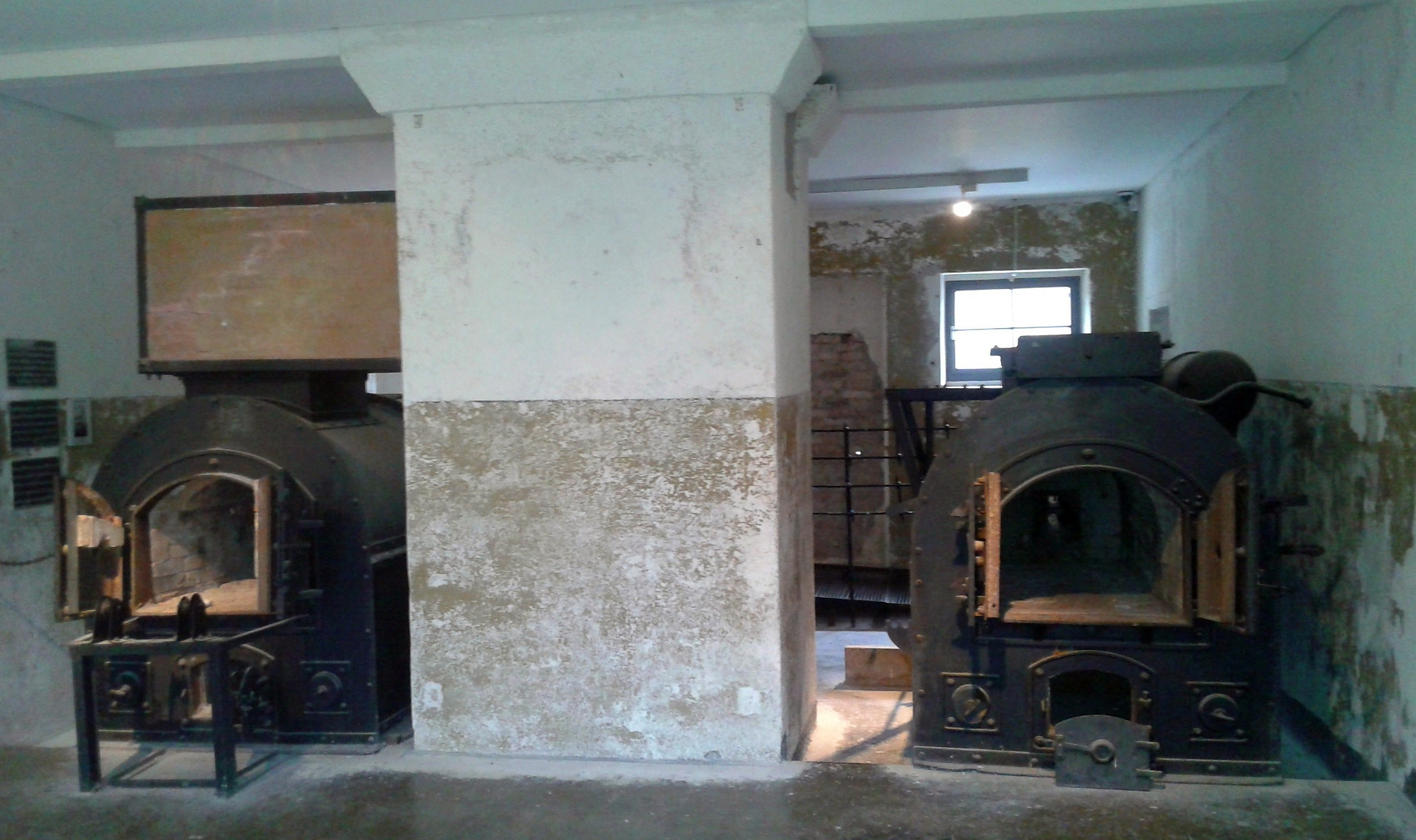 KZ-Gedenkstätte Mittelbau-Dora: Verbrennungsraum des Krematoriums mit zwei Einzelretorten-Verbrennungsöfen der Firma Kori GmbH in Berlin